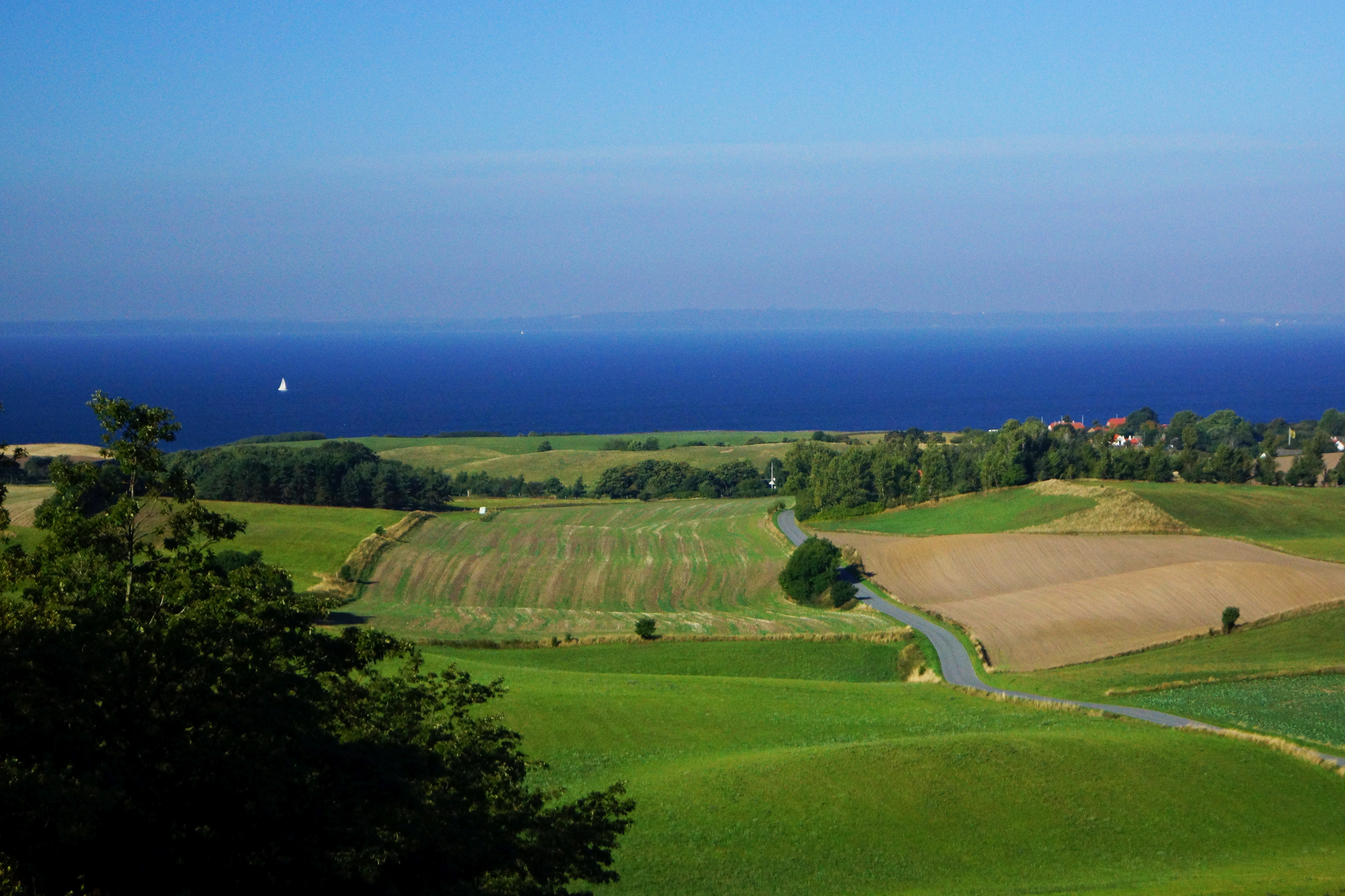 Udsigt fra udsigtaspunktet, Ellemandsbjerg, på Helgenæs, Mols, det sydlige Djursland